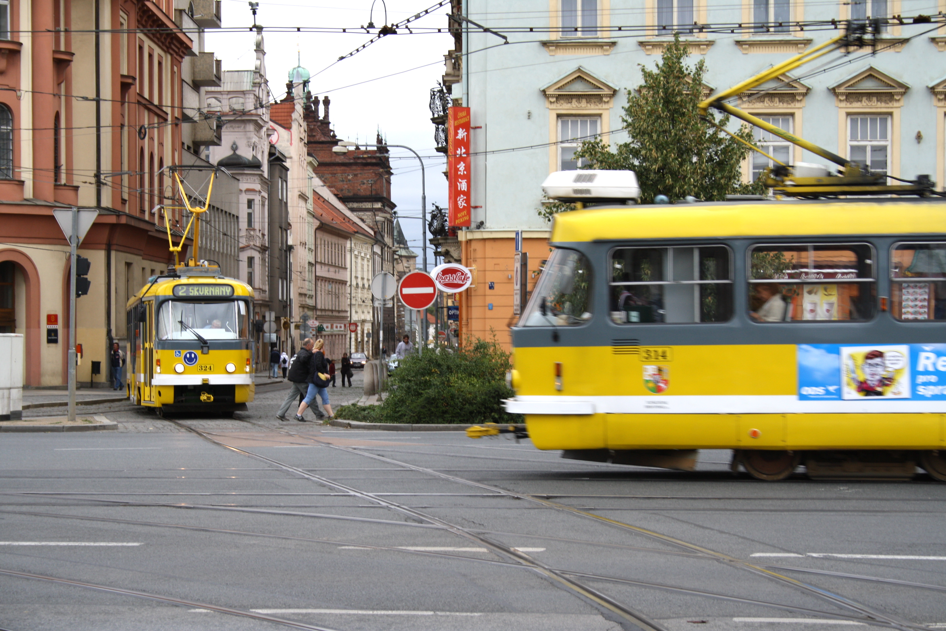 Tatra T3P Pilsen